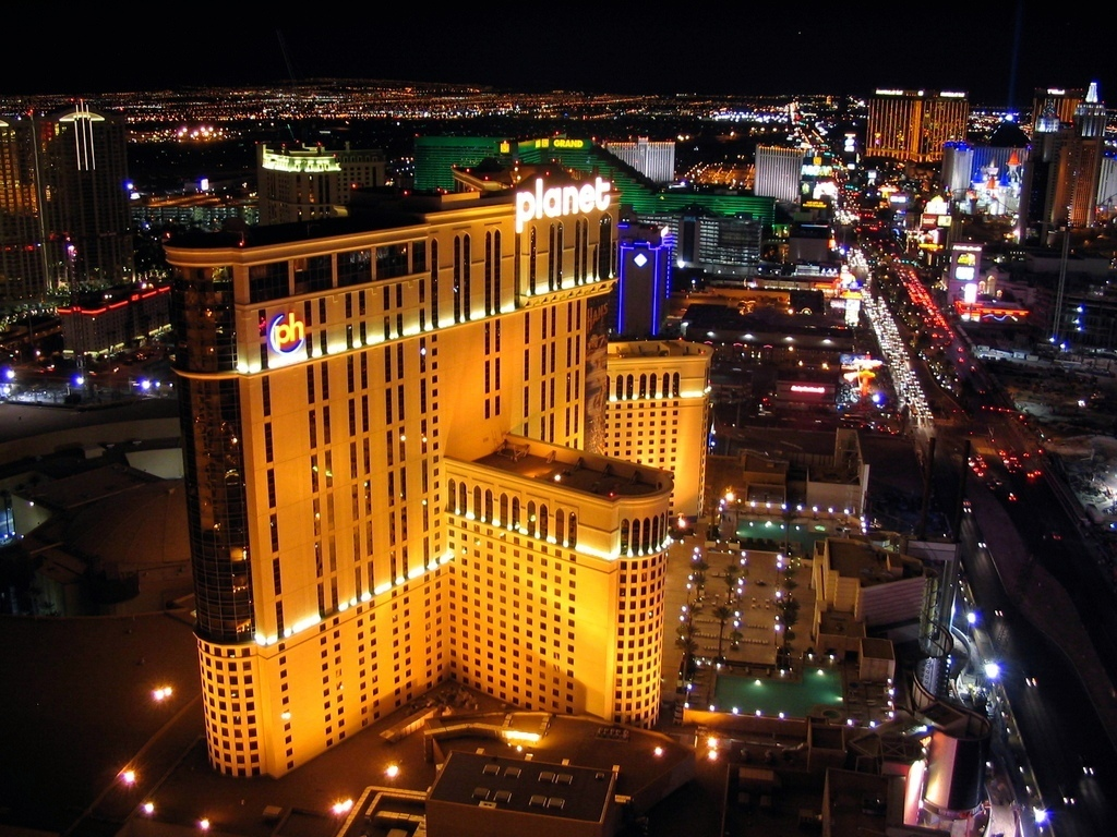 Planet Hollywood y vista hacia el sur, desde el piso de observación de la Torre Eiffel del Paris Las Vegasimg_8237.jpg